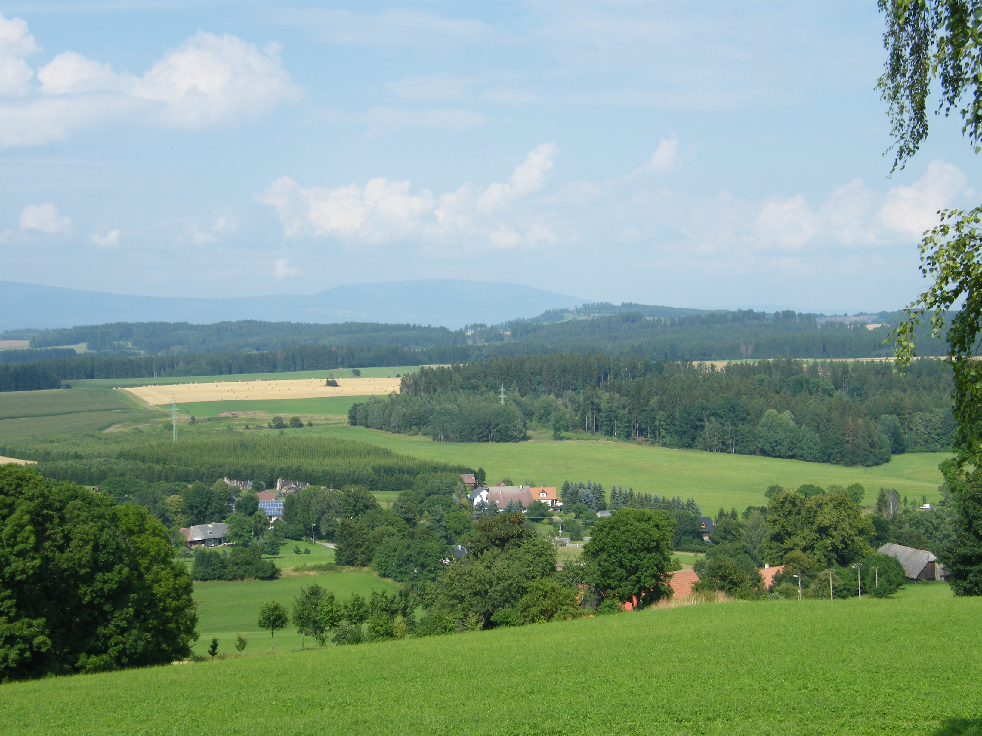 Karlov (Stará Paka)